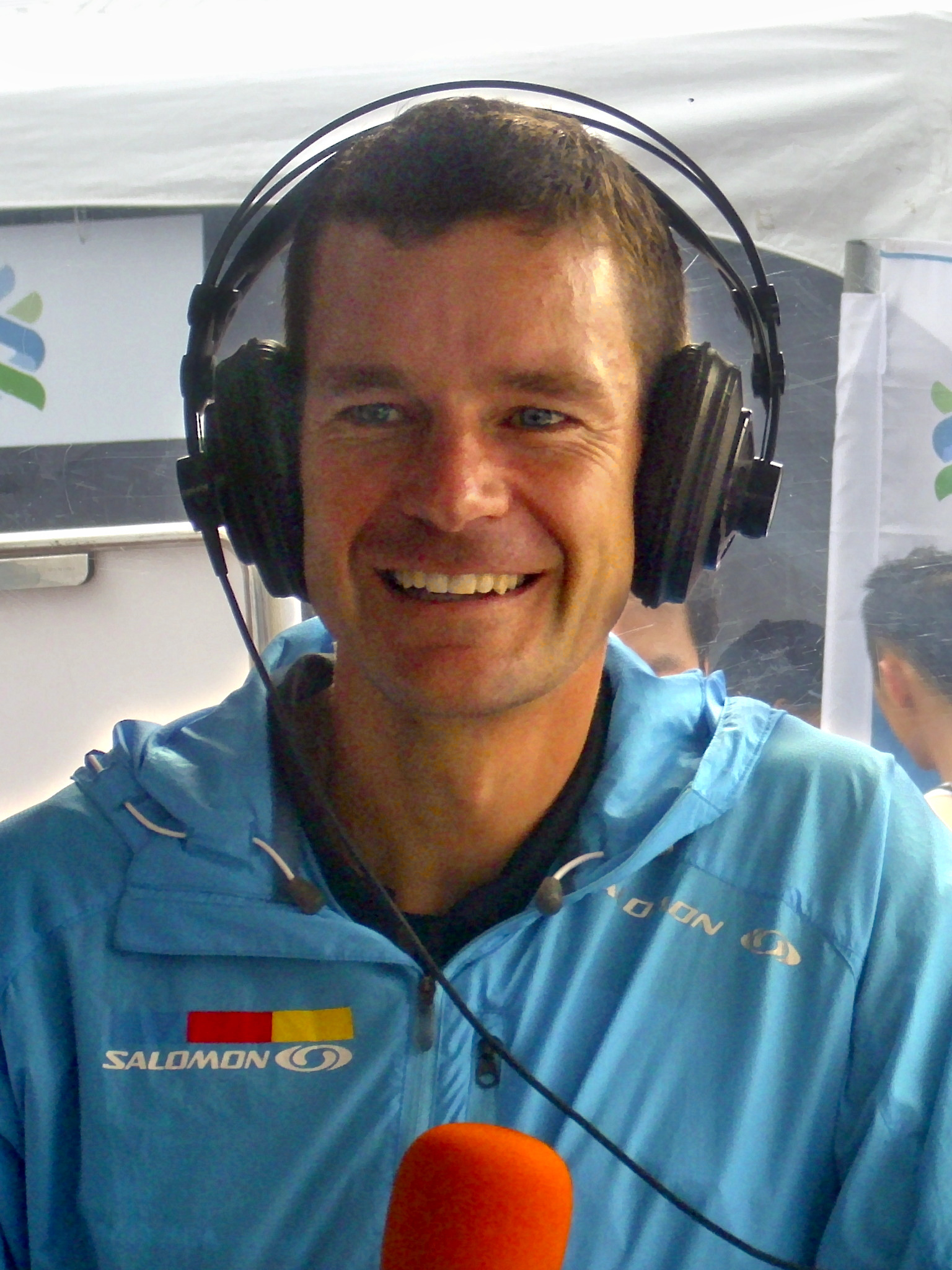 2010 Taipei 101 Run Up: Jonathan Wyatt.